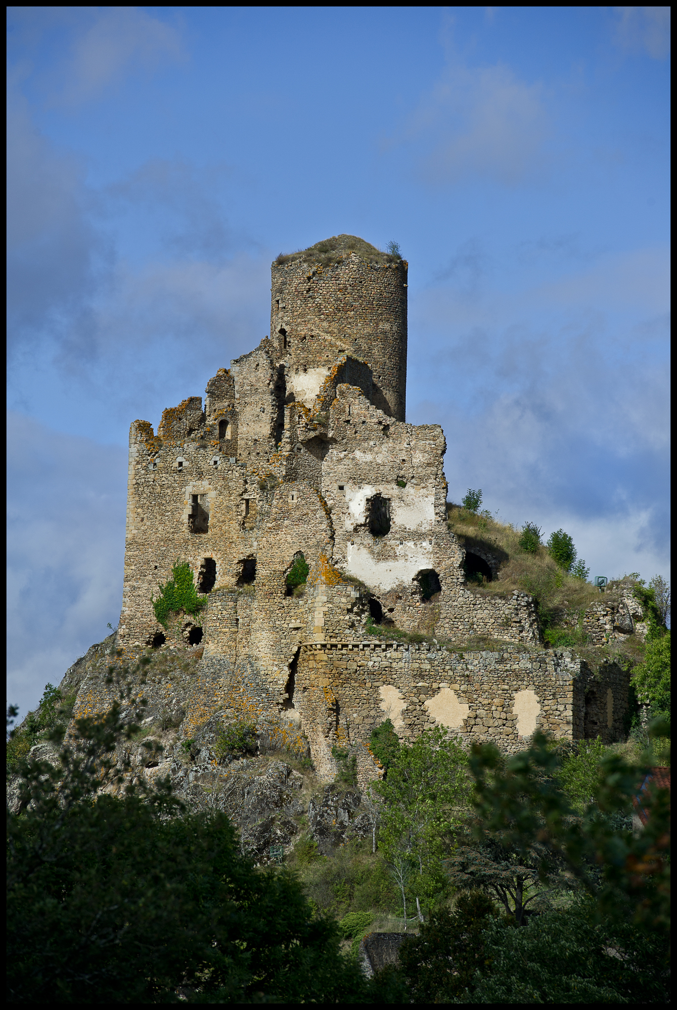 Château de Léotoing, (Inscrit, 1992)